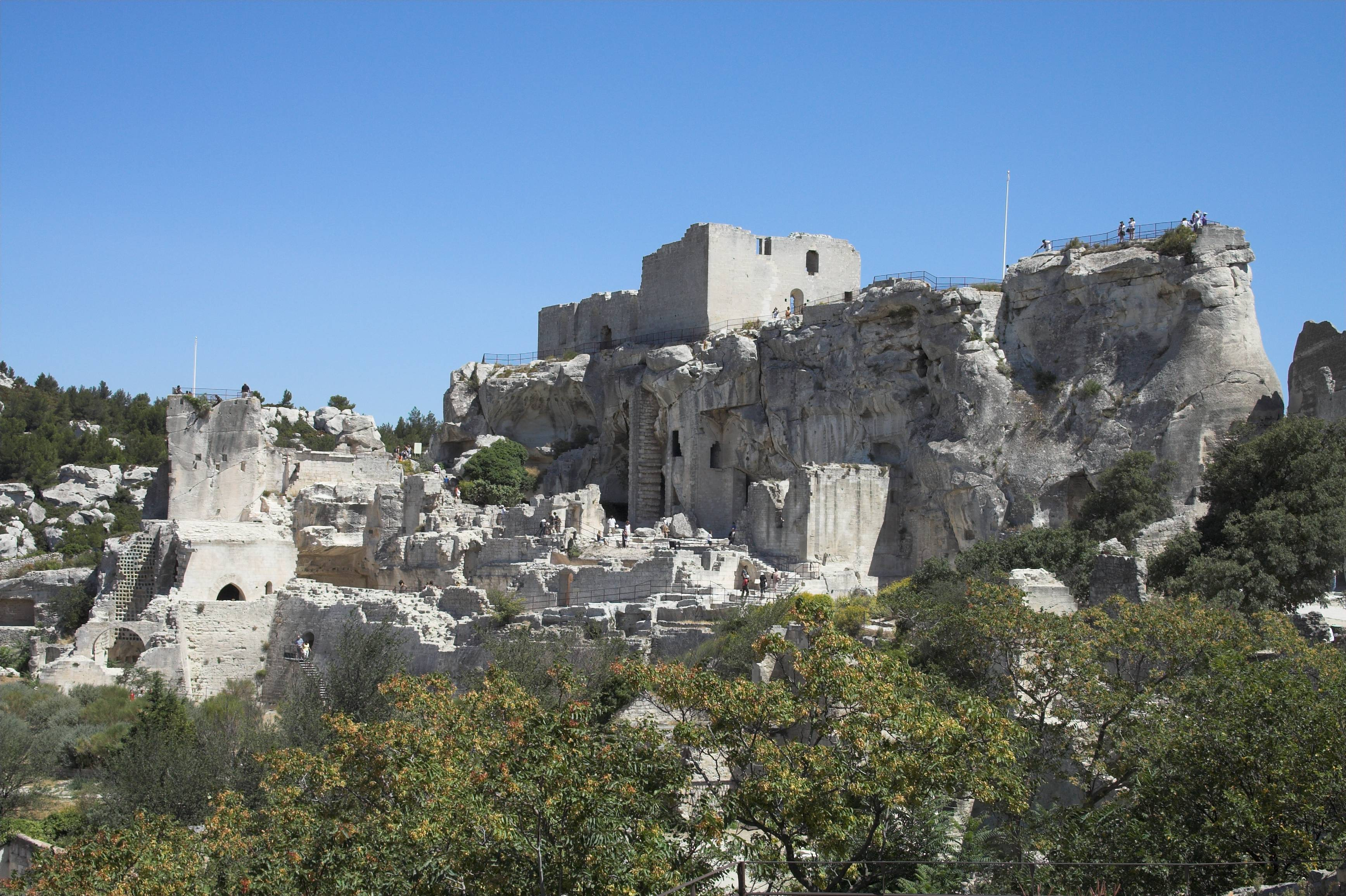 Château des Baux (Les Baux de Provence, France)